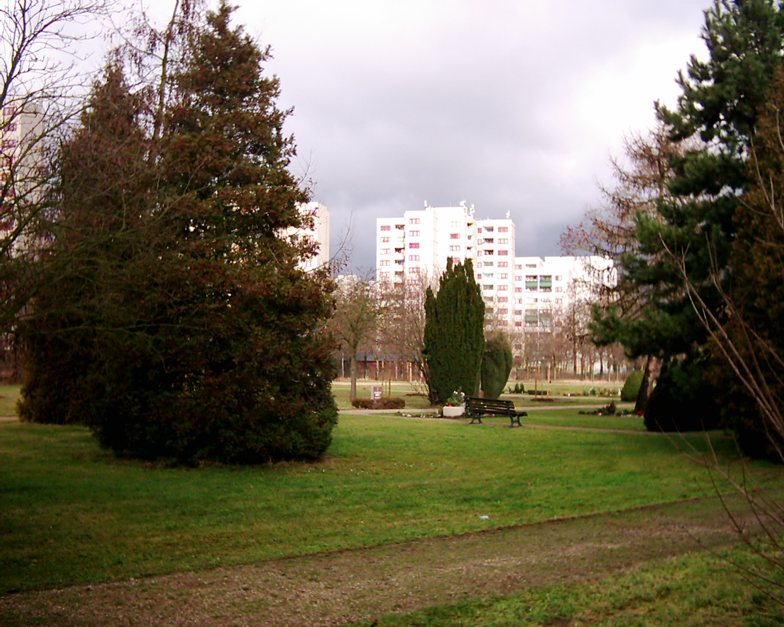 Friedhof Pankow VII - Urnengemeinschaftsanlage - vormals Bereich der Berliner Mauer